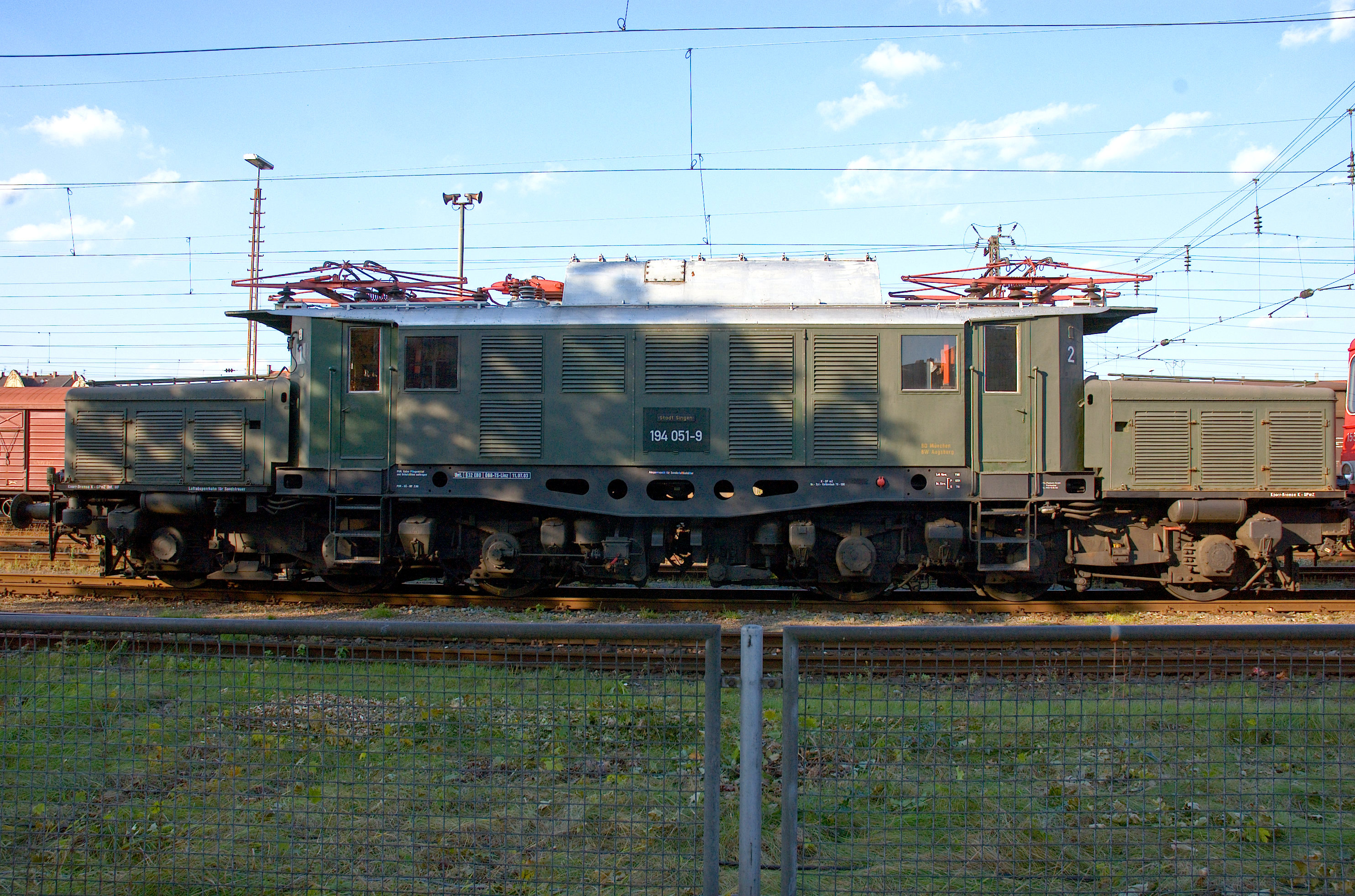 DRB Baureihe E 94 Lok auf Loktreffen Fürth 2007